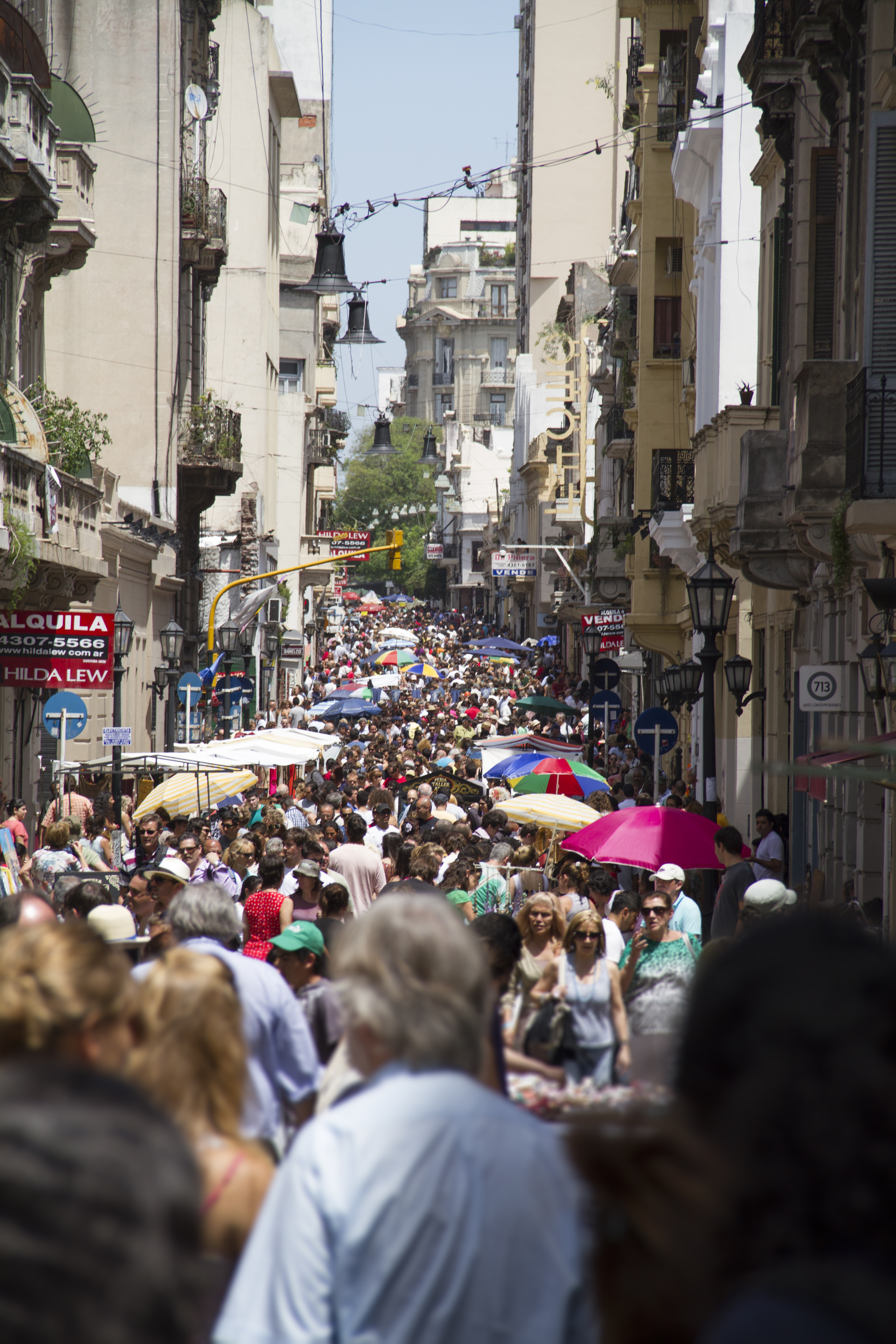 Feira de San Telmo - Avenida Defensa, Buenos Aires, Argentina.